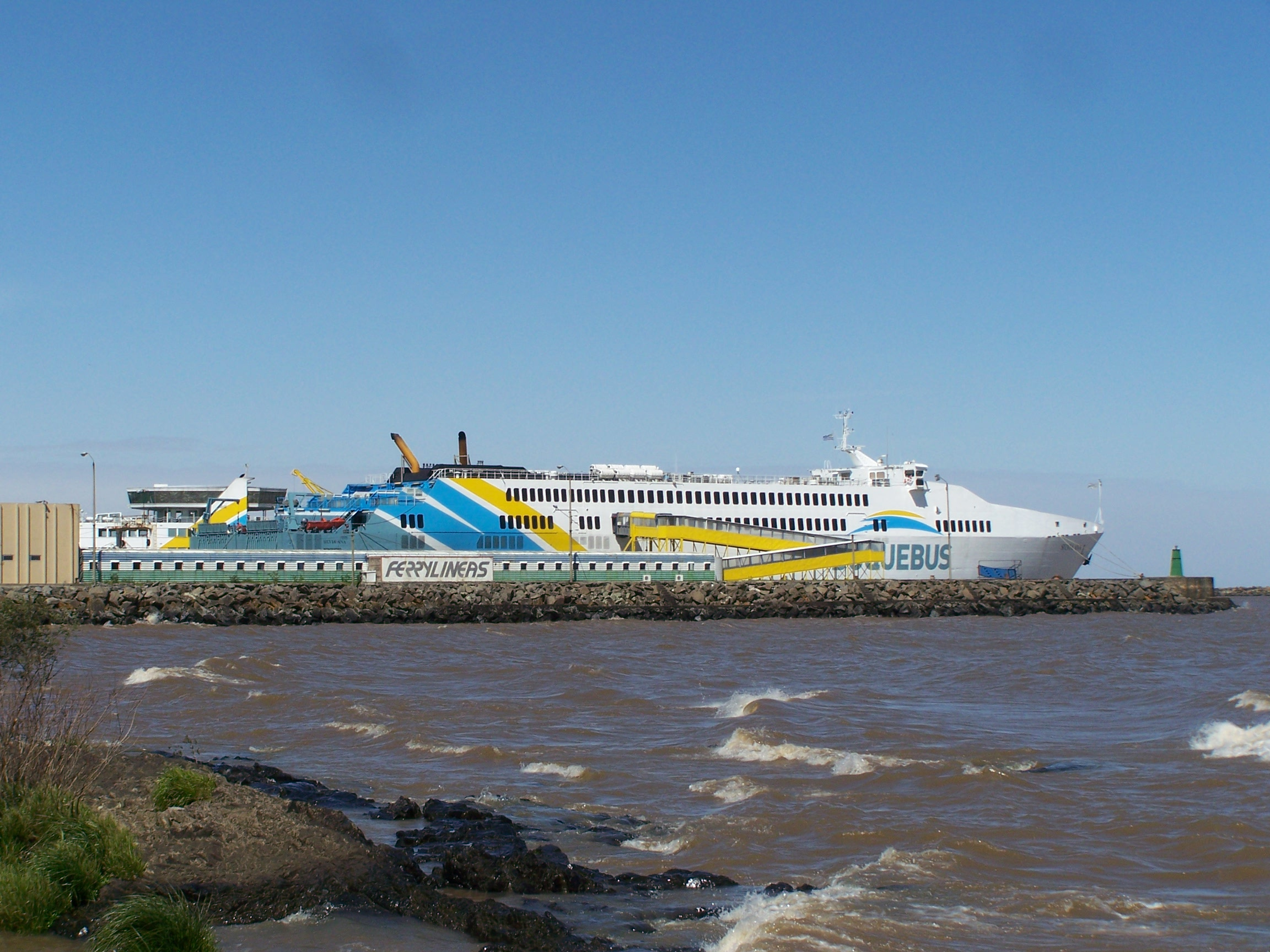 Das Schiff von Buquebus, das in ein paar Stunden in Richtung Buenos Aires aufbricht